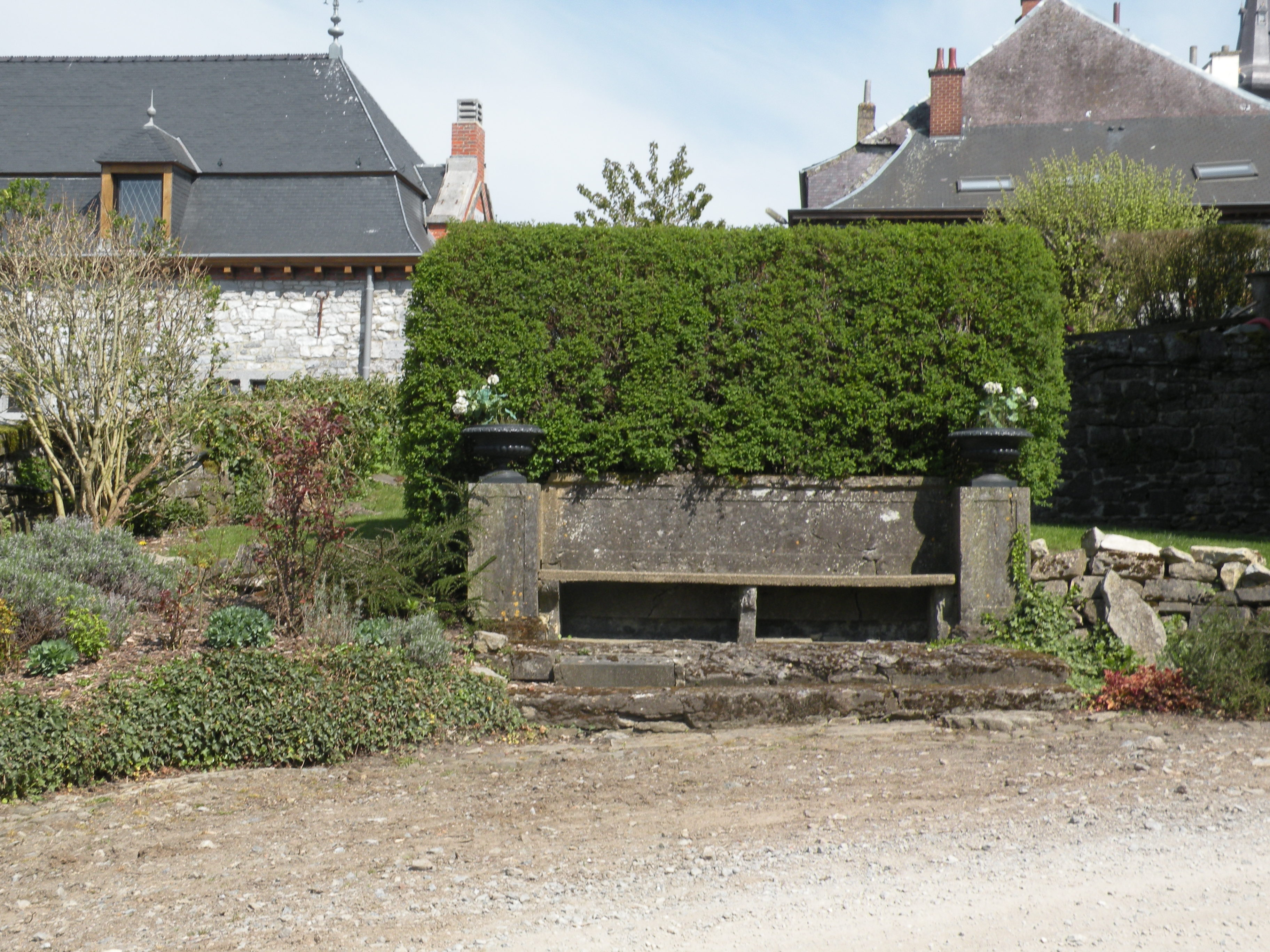 exterieur du chateau de Chimay